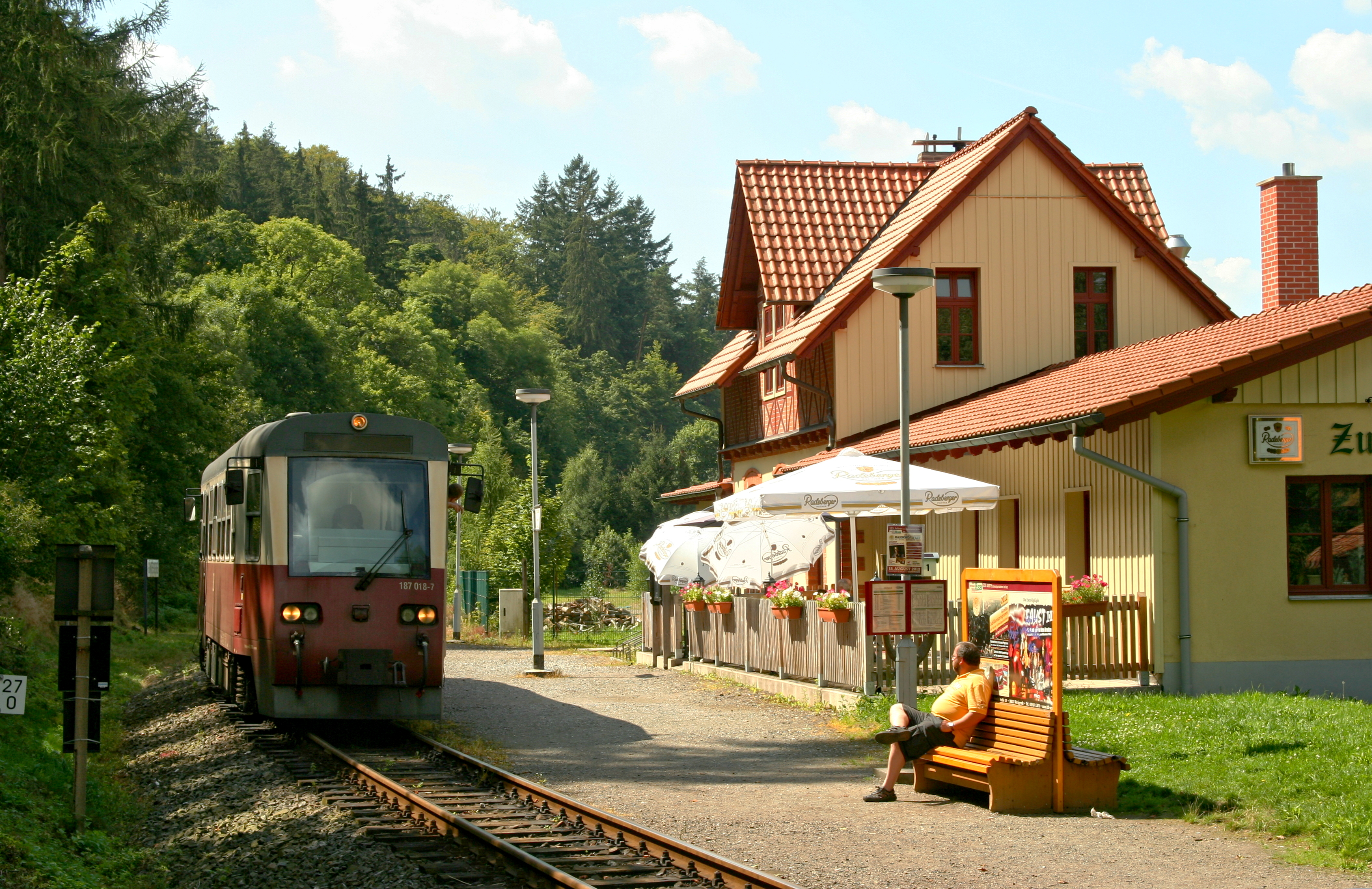 Haltepunkt Güntersberge der HSB mit Dieseltriebwagen 187 018 am 17. August 2012